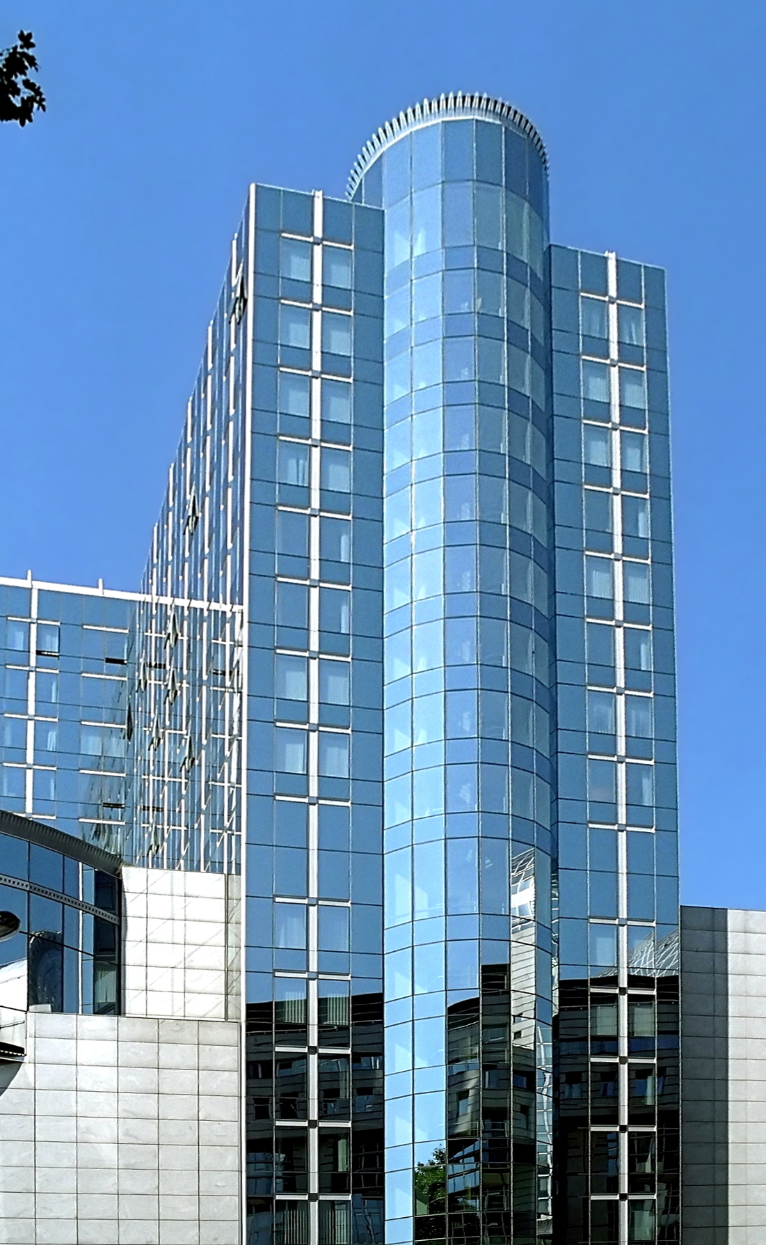 Belgique - Bruxelles - Parlement européen - arrière du bâtiment Altiero Spinelli (Architecture postmoderne en Belgique - Atelier d'architecture de Genval - 1987-2004)